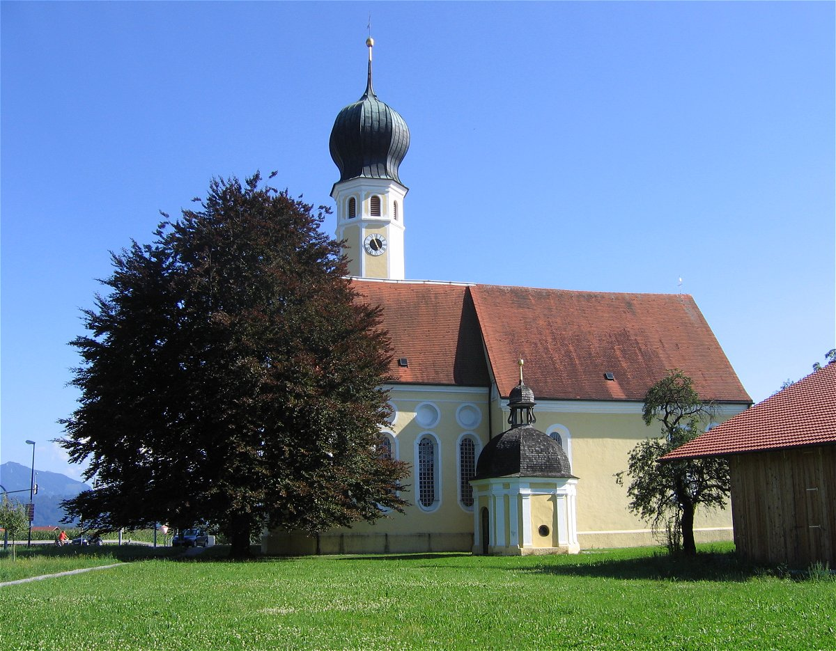 Rosenheim, Kirche Hl. Blut